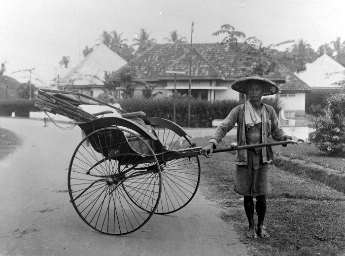 Repronegatief. Rikshaw, voortgetrokken door een chinese man, Medan Caption: A Chinese rickshaw puller posing with his rickshaw in Medan (Note: he is not actually pulling the rickshaw in the photo, so I have put "posing")